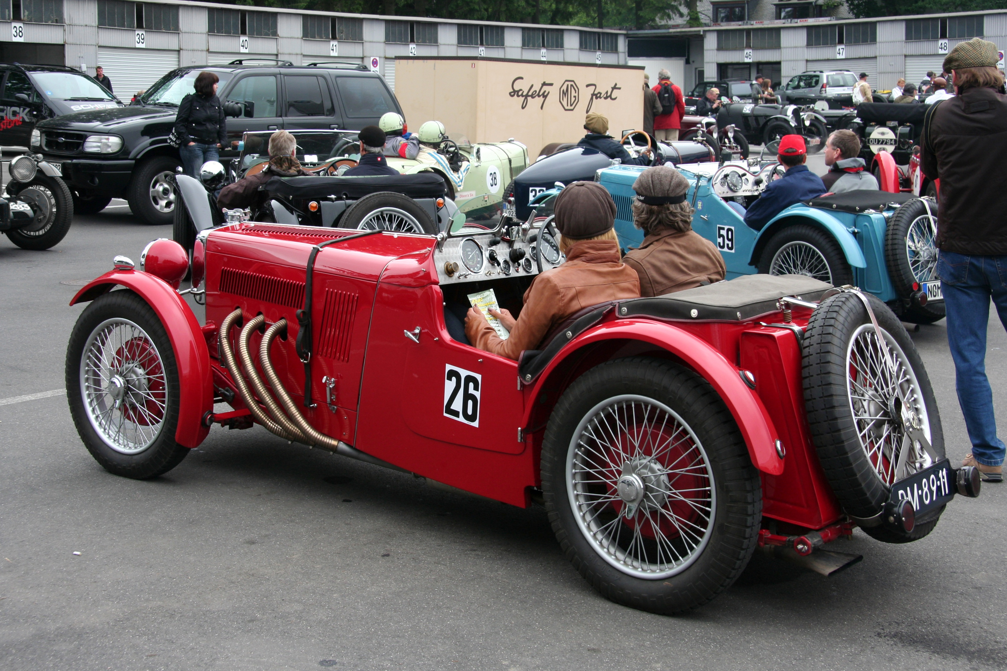 MG F2, Baujahr 1932, beim DAMC 05 Oldtimer-Festival auf dem Nürburgring